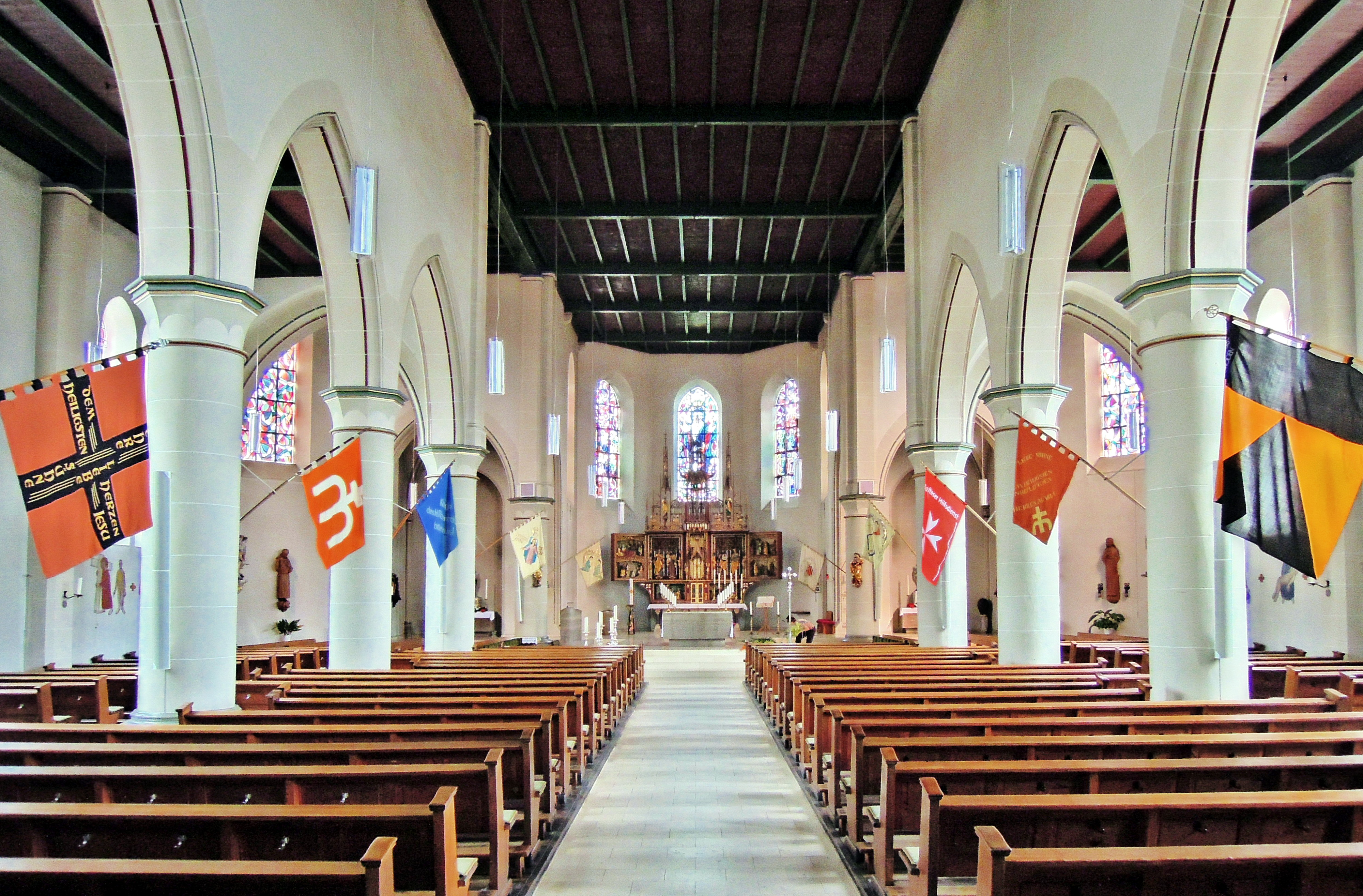 Donatusstraße kath. Pfarrkirche Maria Himmelfahrt